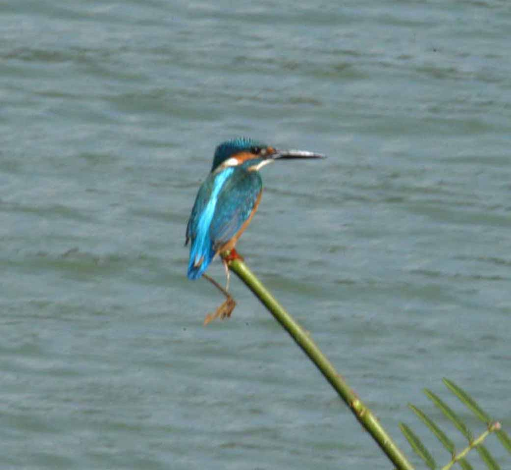 Martin pêcheur d'Europe, population asiatique, Khao Yai, Thaïlande.